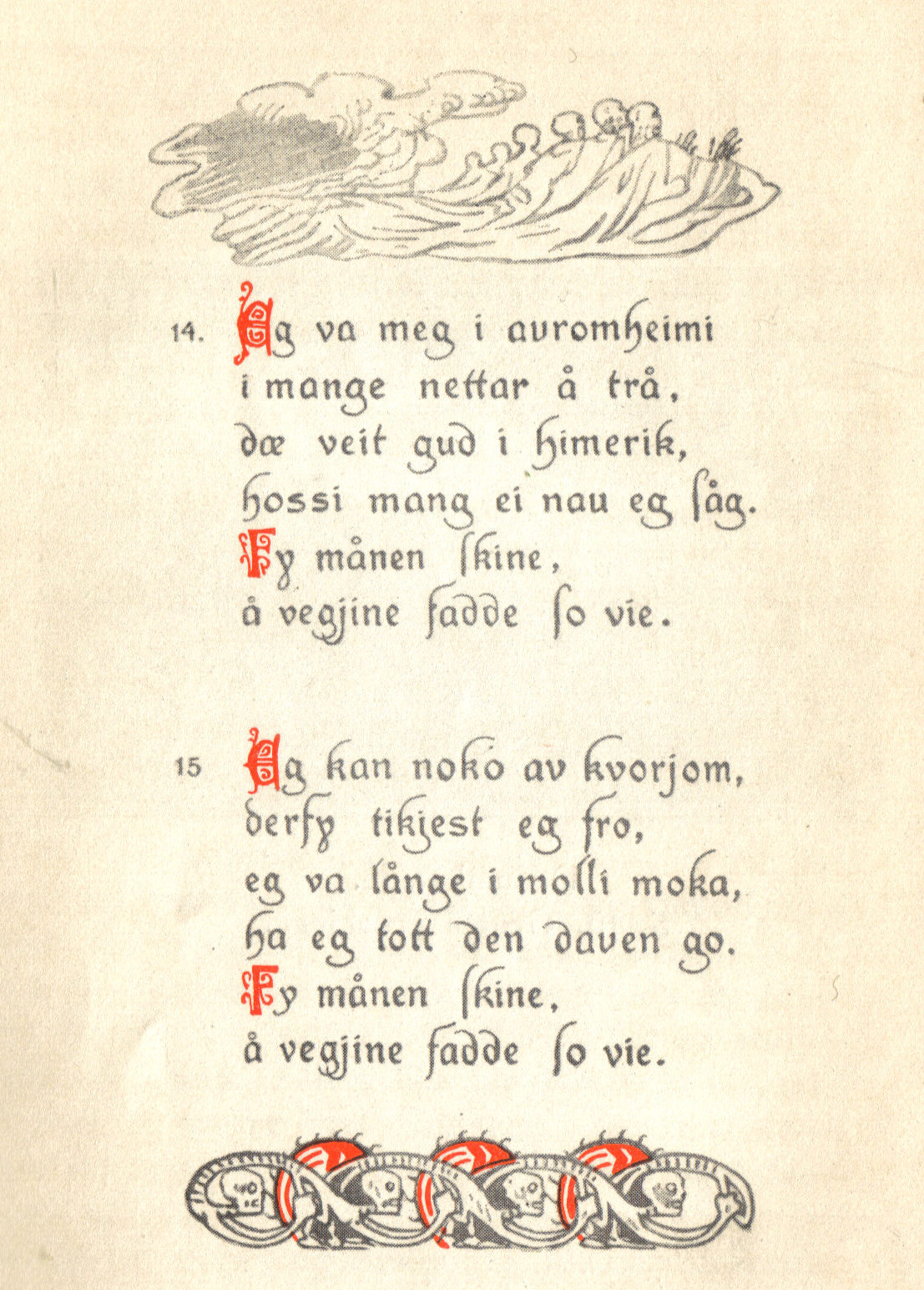 Side 7 i Draumkvæde, utgitt av Foreningen for norsk bogkunst i 1904. Illustrasjoner av Gerhard Munthe.